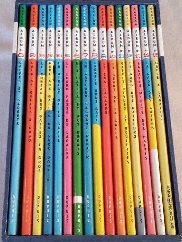 Les albums de Gaston, ici à dos ronds.